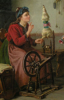 detail